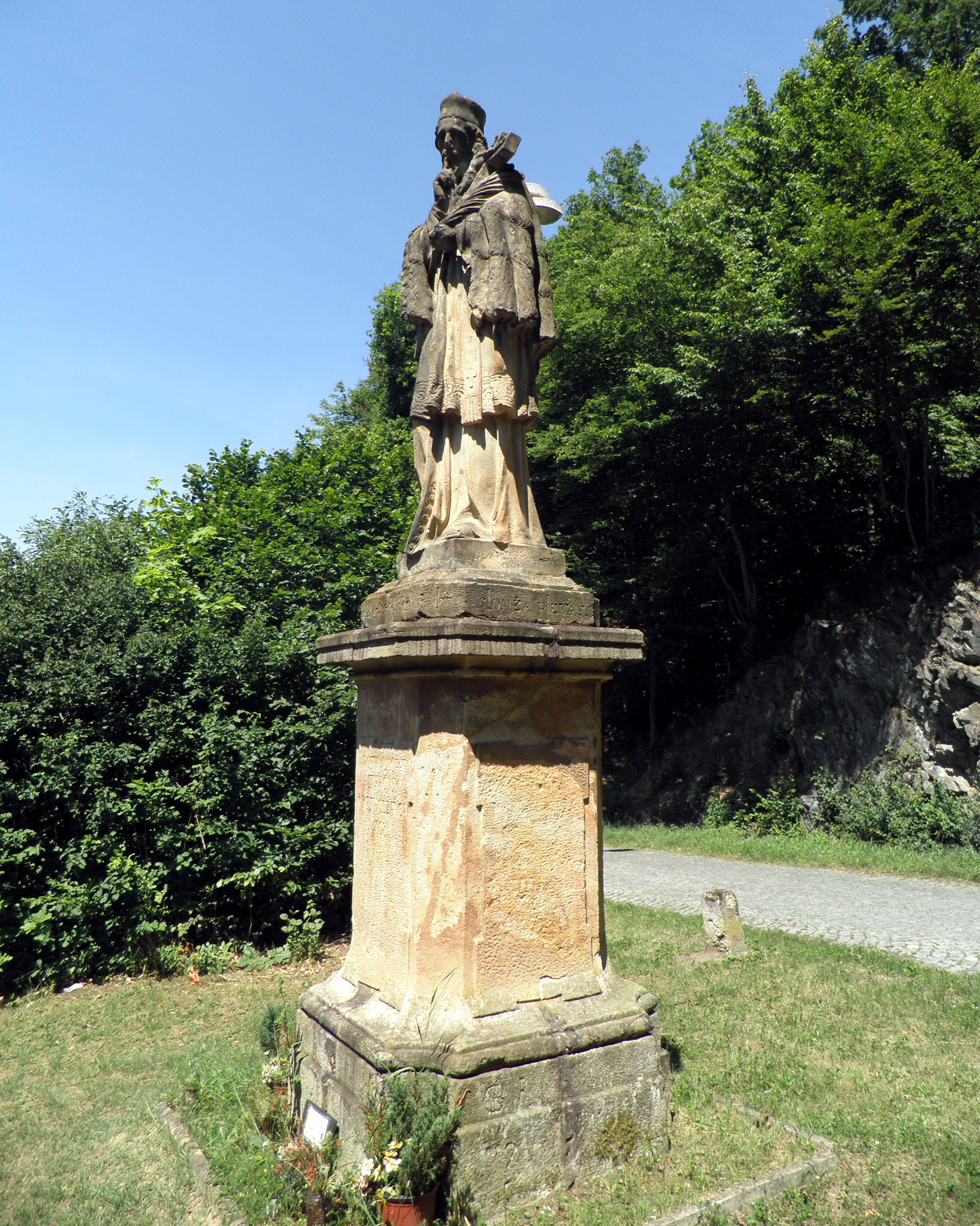 Socha sv. Jana Nepomuckého (Třebenice), pod Slapskou přehradou, Třebenice